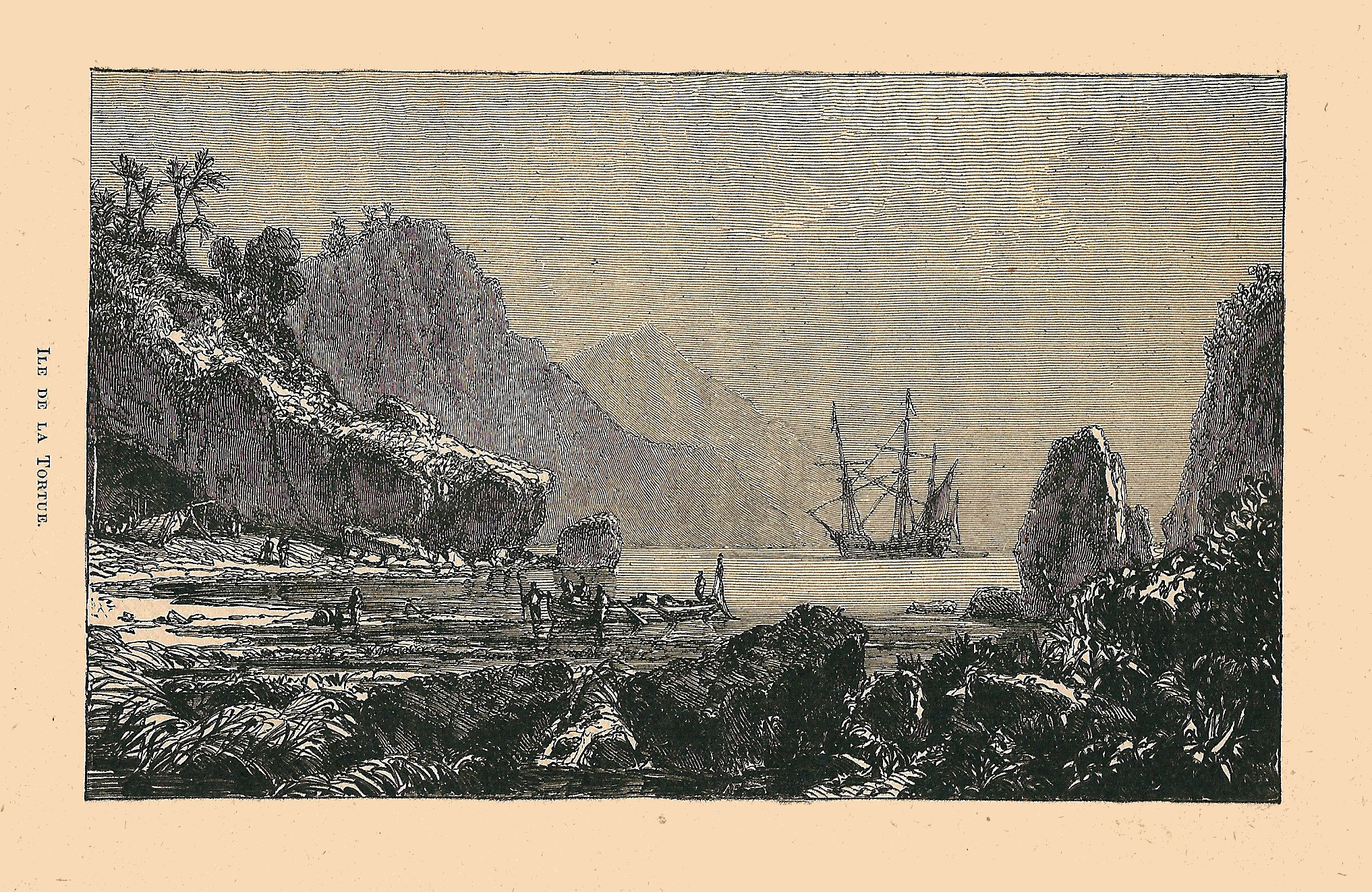 Ile de la Tortue, à la fin du XIXe siècle.